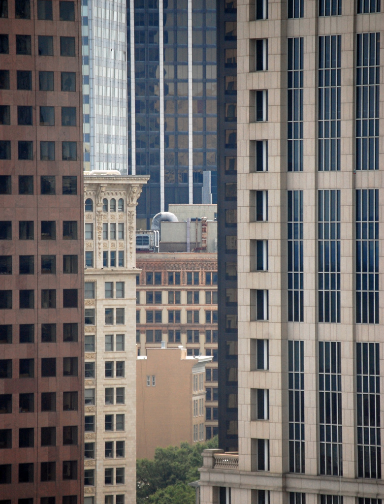 Atlanta architectural contrast